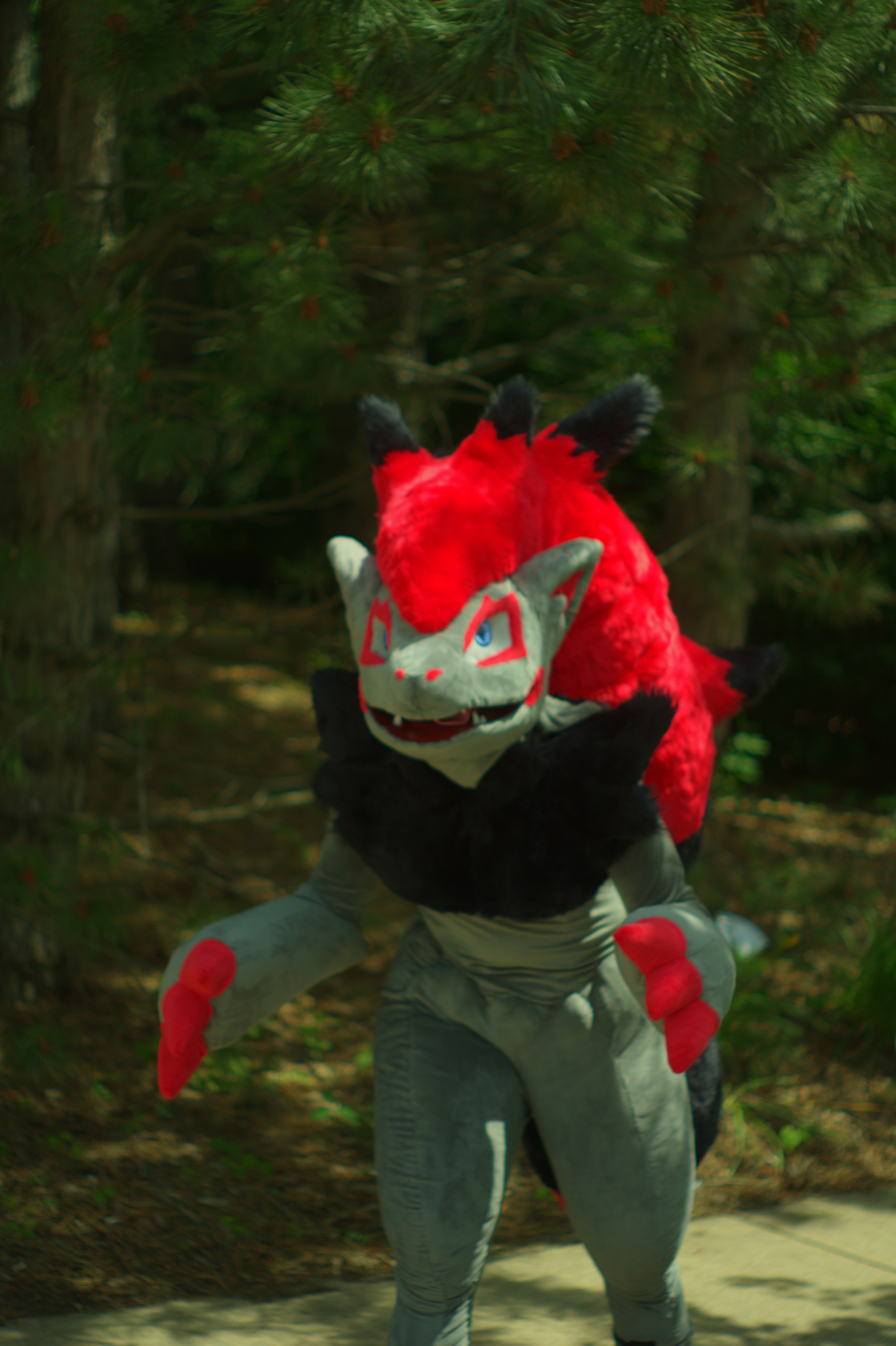 Costume de Zoruark.